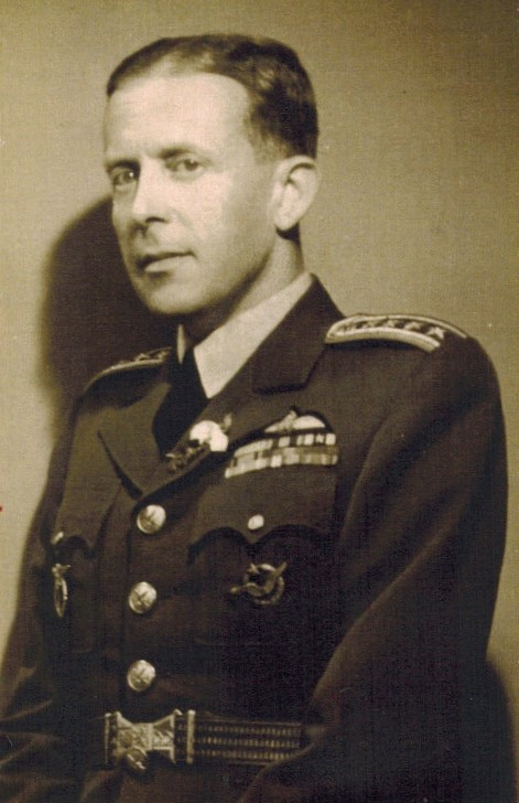 Velitel Vojenského leteckého učiliště v Prostějově v letech 1945-1948